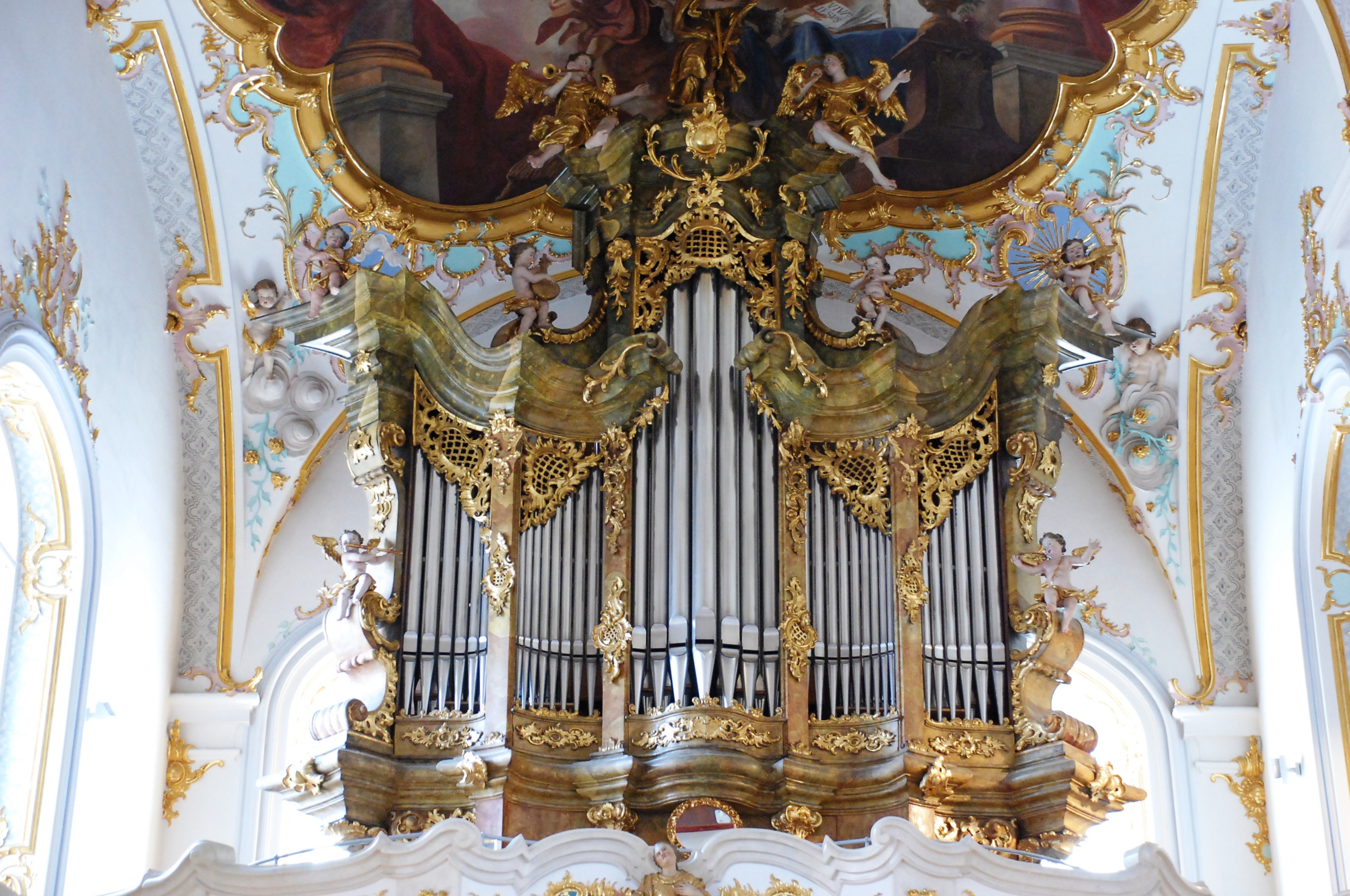 Schulkirche Amberg-Bavière